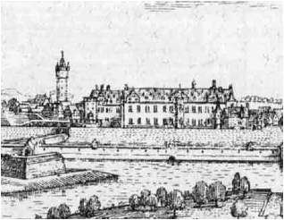 Ausschnitt des Originalfiles der Stadt Kassel von 1655 von Matthäus Merian, das ehemalige Stadtschloss zeigend.